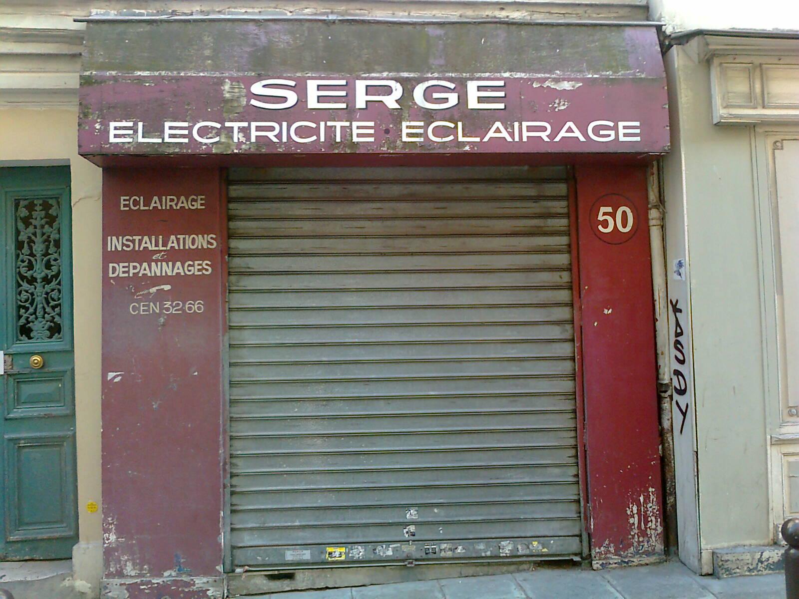 Devanture avec rideau de fer abaissé et enseigne de boutique peinte - 50 rue Beauregard (Paris - 2e). Numéro de téléphone : CEN(tral) 32.66.